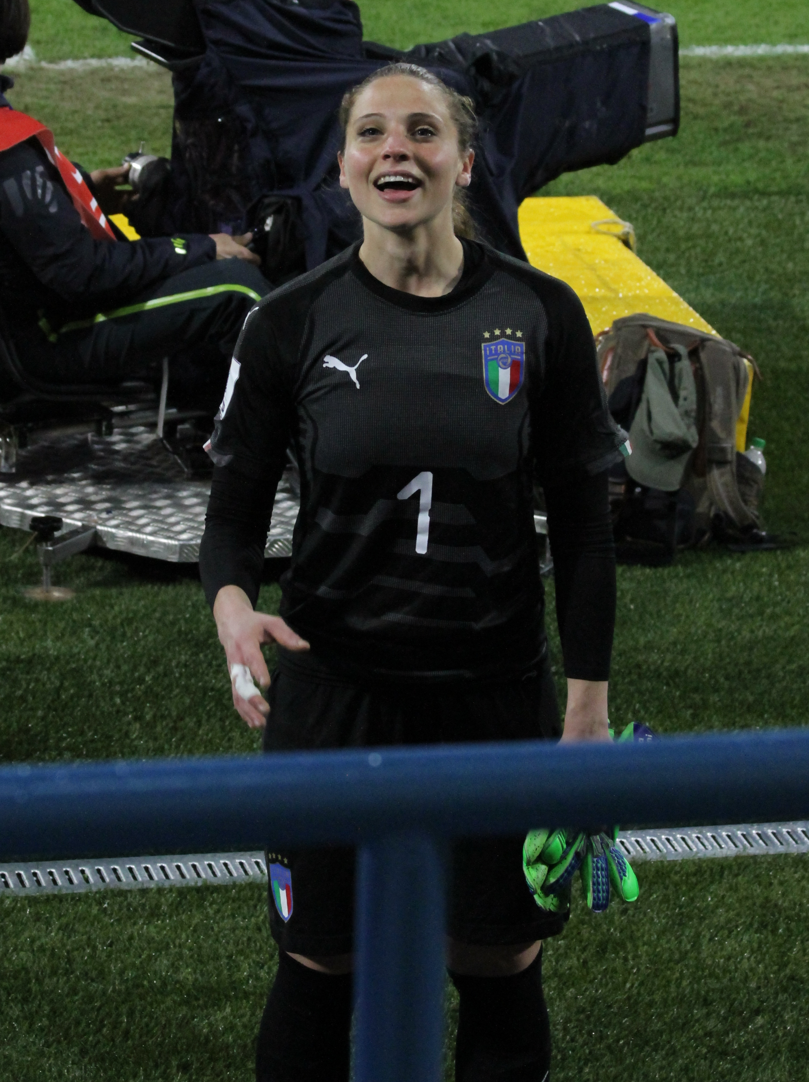 Ferrara, 10 aprile 2018: Italia vs Belgio, qualificazioni al Mondiale di Francia 2019, scatti a fine incontro. Laura Giuliani.